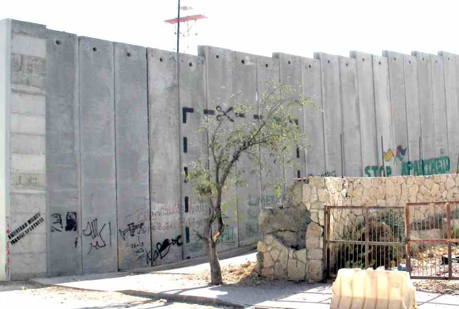 Mur de séparation construit par Israël à l'entrée de Bethléem. Vue côté palestinien, août 2005.